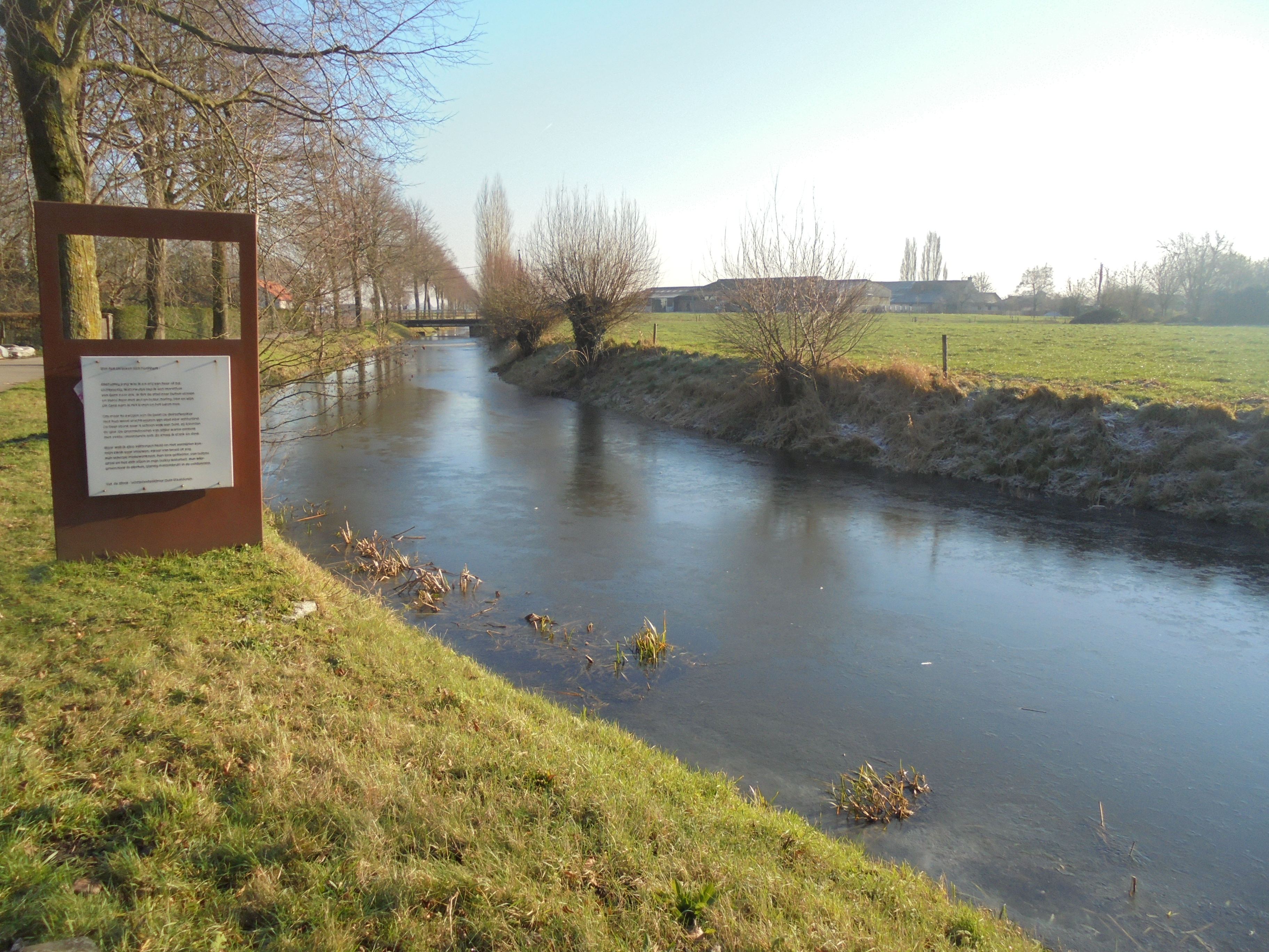 De Lieve met iets verder de Beirtjesbrug - Waarschoot - Lievegem - Oost-Vlaanderen - België